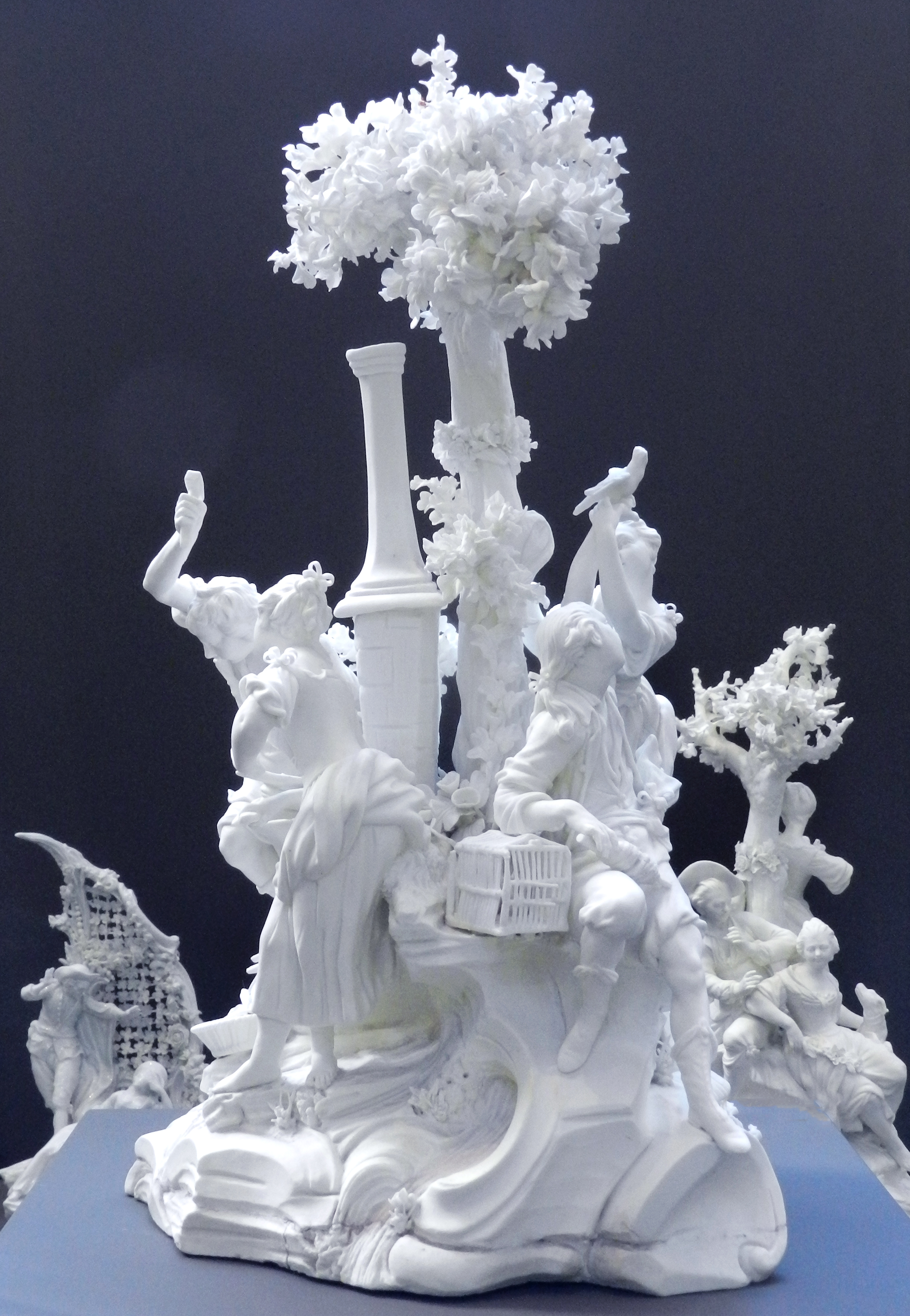 Biscuit de Porcelaine tendre Belgique, Tournai Seconce moitié du XVIIIe siècle This is a file created at the museum: Musée royal de Mariemont in Morlanwelz